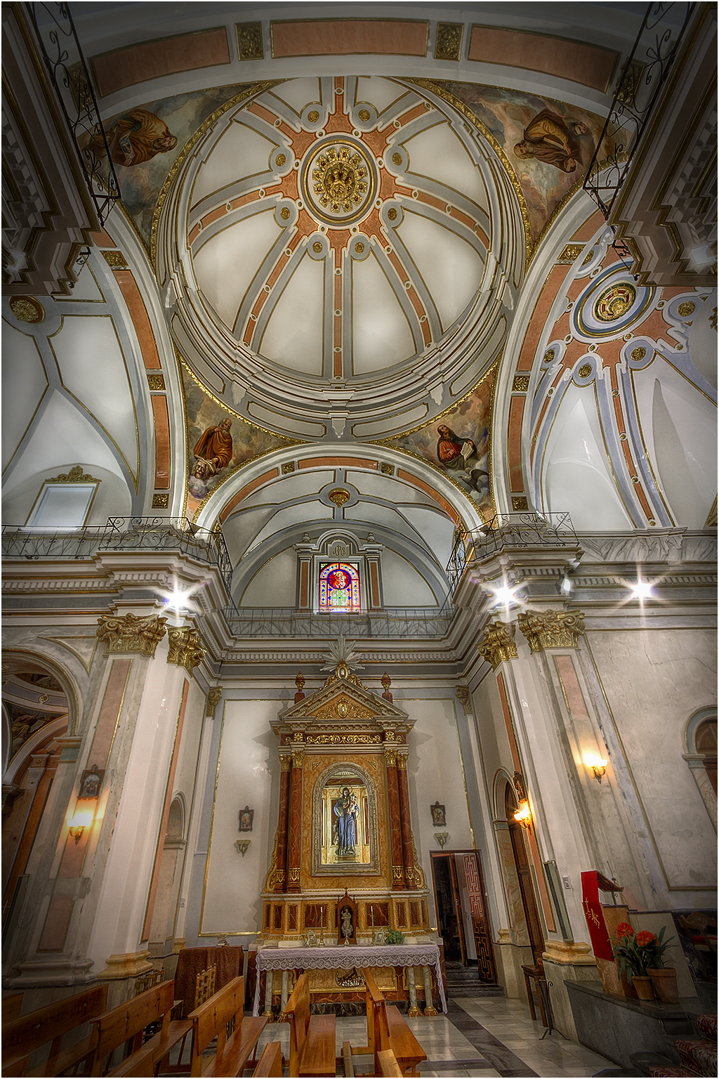 El pueblo nació como comunidad cristiana debido a la llegada de los primeros pobladores procedentes de Barcelona, que trajeron con ellos la fe cristiana. Durante los primeros siglos perteneció a la Parroquia Asunción de N.S. de Albaida, y desmembrada de ésta, fue fundada en 1535 contando con los territorios de Montaberner, Colata y Bufali. En 1605, el párroco Pere Leandro Sanchis ordena y organiza los documentos sacramentales. La expulsión de los moriscos en 1607 trajo consigo la desaparición de la fiesta de San Juan, y en 1624 fue fundada la Cofradía de la Virgen del Rosario, destacando también en este siglo la construcción de la segunda ermita de Colata. Ya el segundo día de pascua de 1678 tuvo lugar el Milagro de San Blas, gracias a la imagen procedente de Bélgida. El siglo XVIII fue el siglo del Dr. José Esplugues, nacido en Agullent en 1705 y fallecido en Montaberner en 1787, a él se debió la construcción de la Iglesia Parroquial y la constatación de la vida y hechos más relevantes de la parroquia, gracias a su manuscrito "Llibre de l’Esglèsia Parroquial". También tuvo lugar el Pleito de Colata, por el que la justicia asignó la partida que lleva este nombre al término municipal. Durante el siglo XIX se crearon diferentes asociaciones en honor al Sagrado Corazón de Jesús. La Iglesia Parroquial comenzó a levantarse en 1735 hasta principios del año 1758. Tres son las campanas de la torre: la más antigua, Santo Tomás de Villanueva data de 1817, mientras las otras dos, Maria dels Dolors y María Loreto fueron fundidas en 1941. También se halla en su demarcación el Colegio de las Monjas, en estado ruinoso y construido durante los años 40.